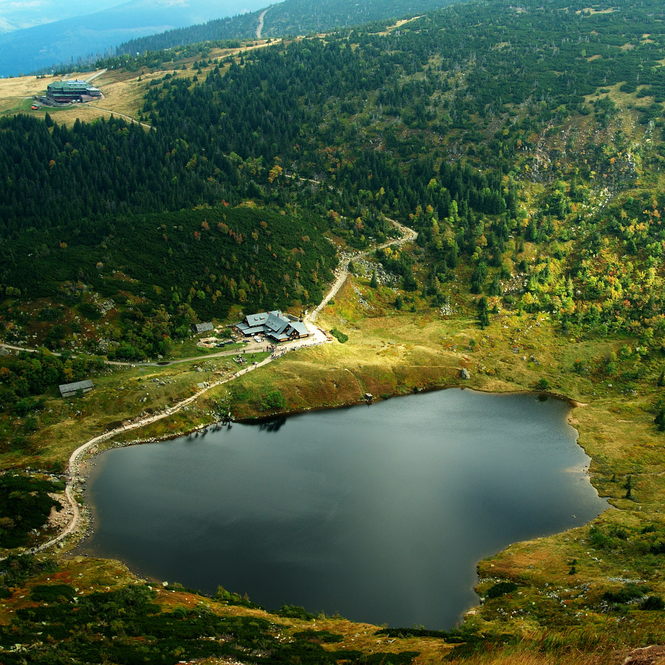 Mały Staw i schornisko Samotnia. U góry Strzecha Akademicka